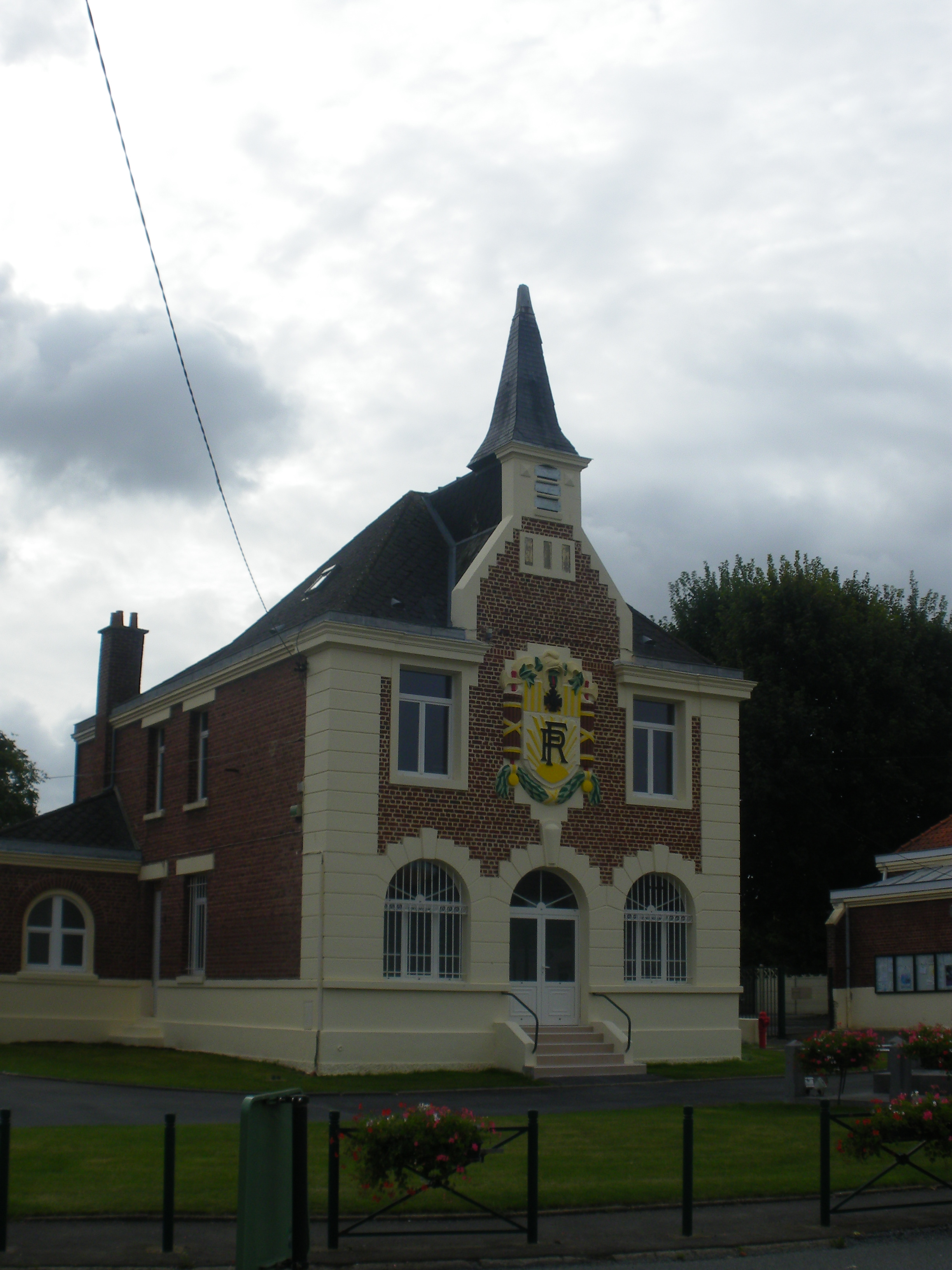 Vue de la mairie d'Arleux-en-Gohelle.